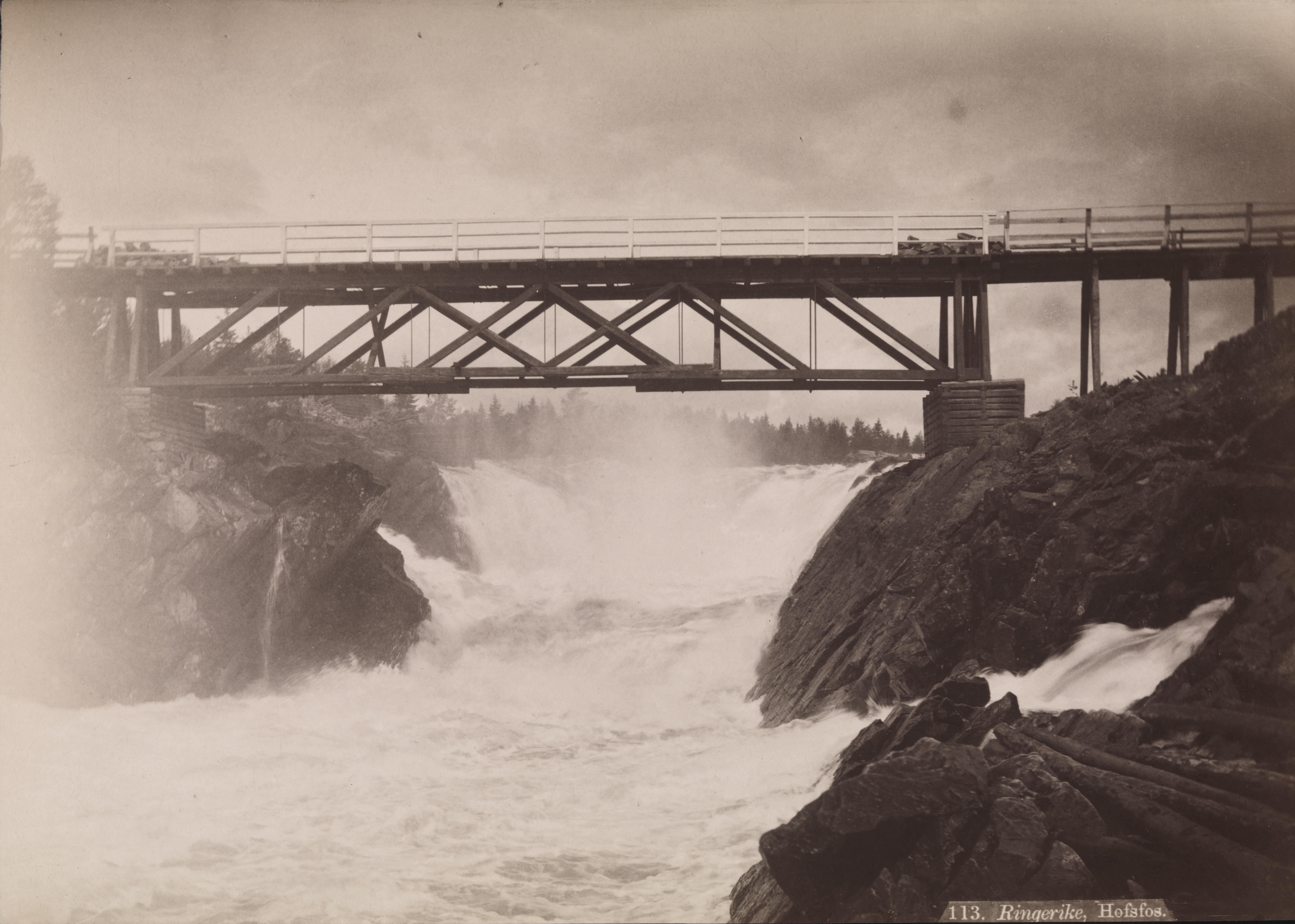 Sted: Hofsfoss Kommune: Ringerike Fylke: Buskerud Tagger: broer fosser landskapsfotografi samferdselsfotografi